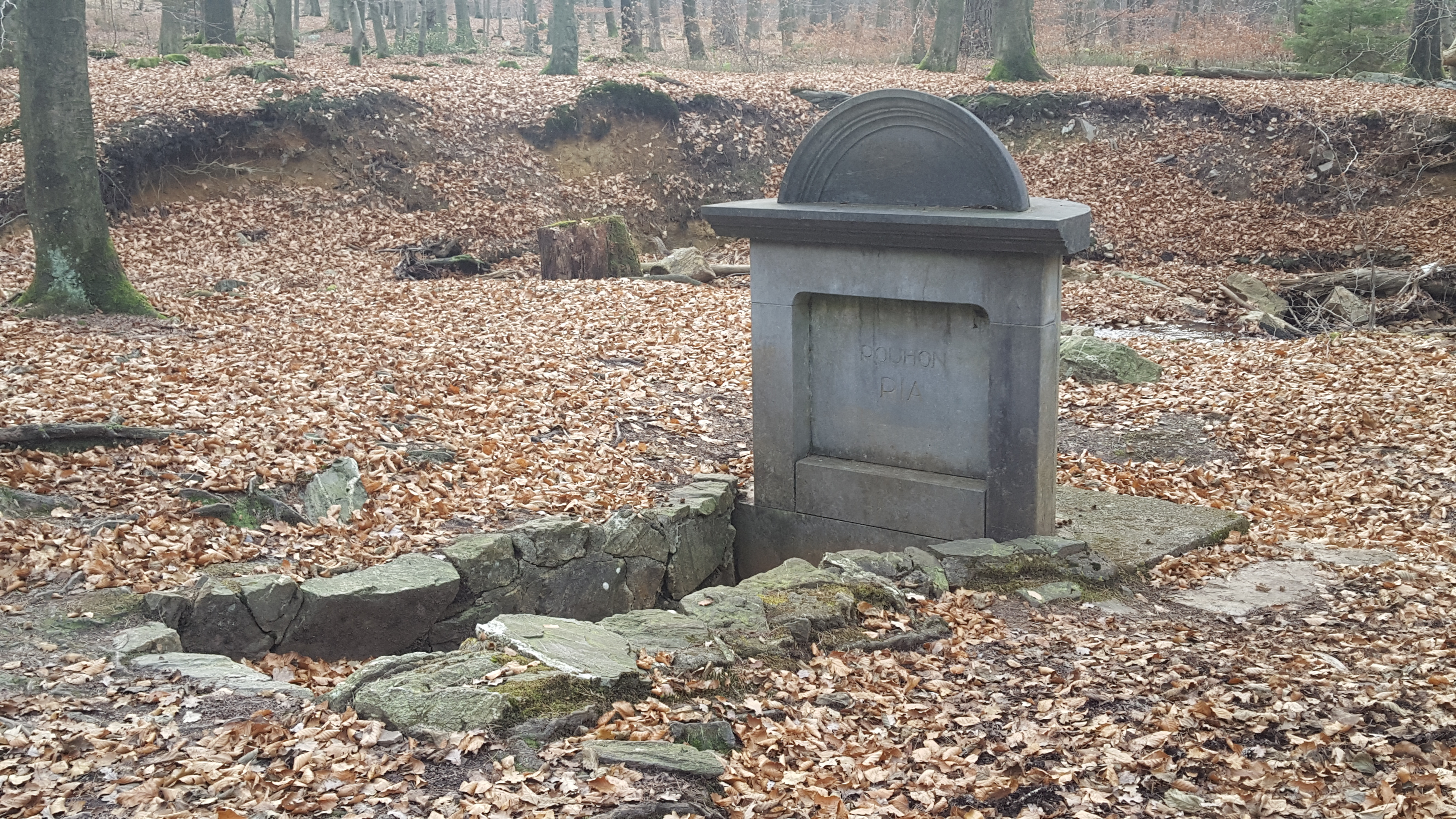 Pouhon Pia, Spa, Belgique